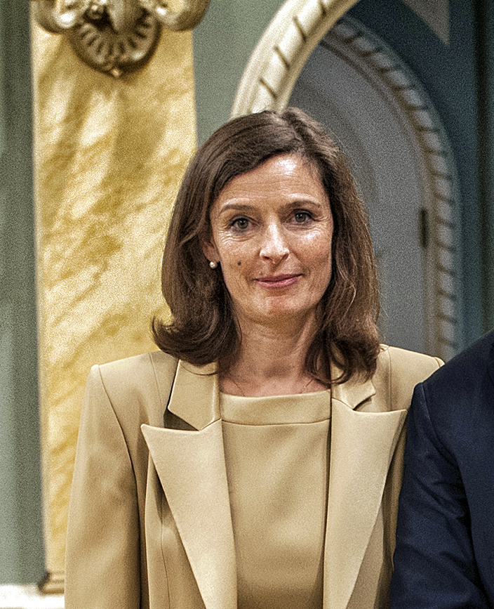 Gita Kalmet, Eesti suursaadik Kanadas